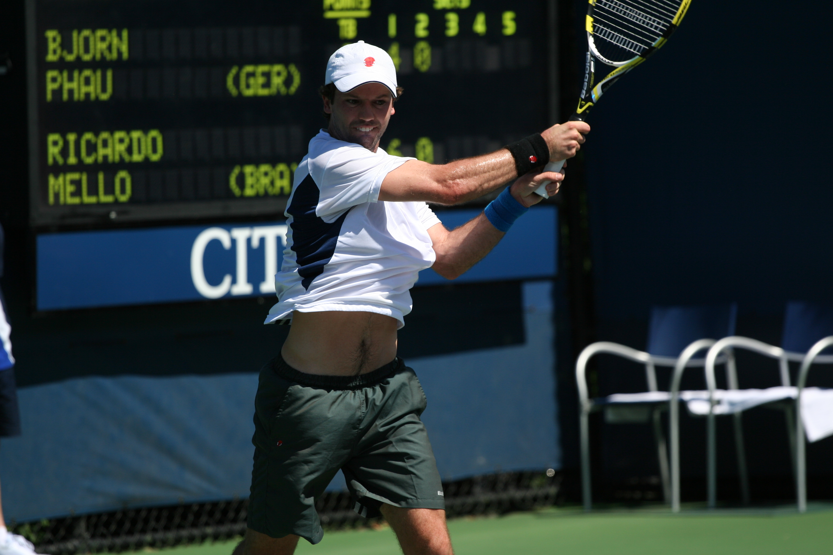 U.S. Open Aug. 30, 2010